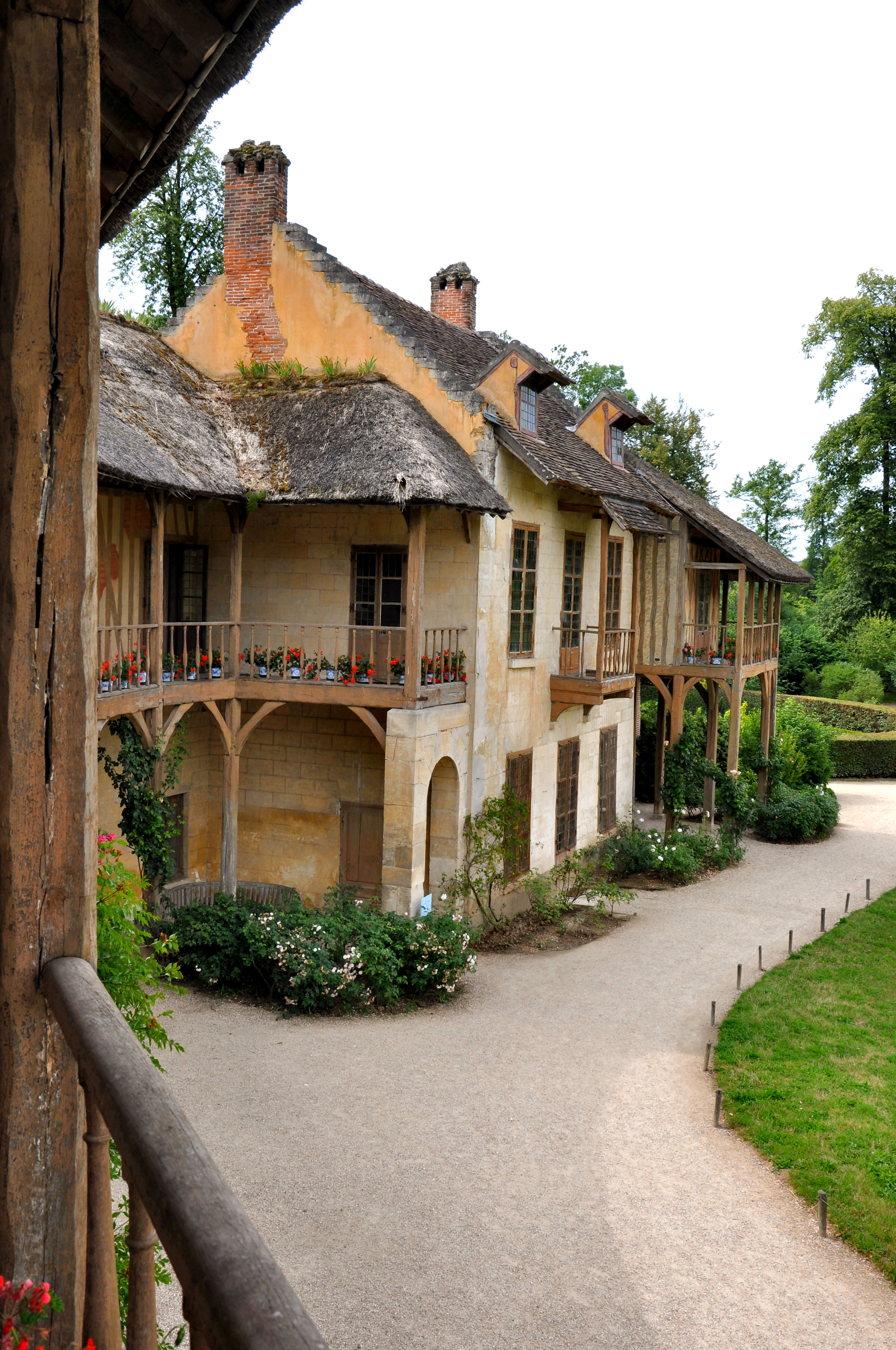 Maison de la Reine au hameau (vue depuis la galerie de la maison du billard)